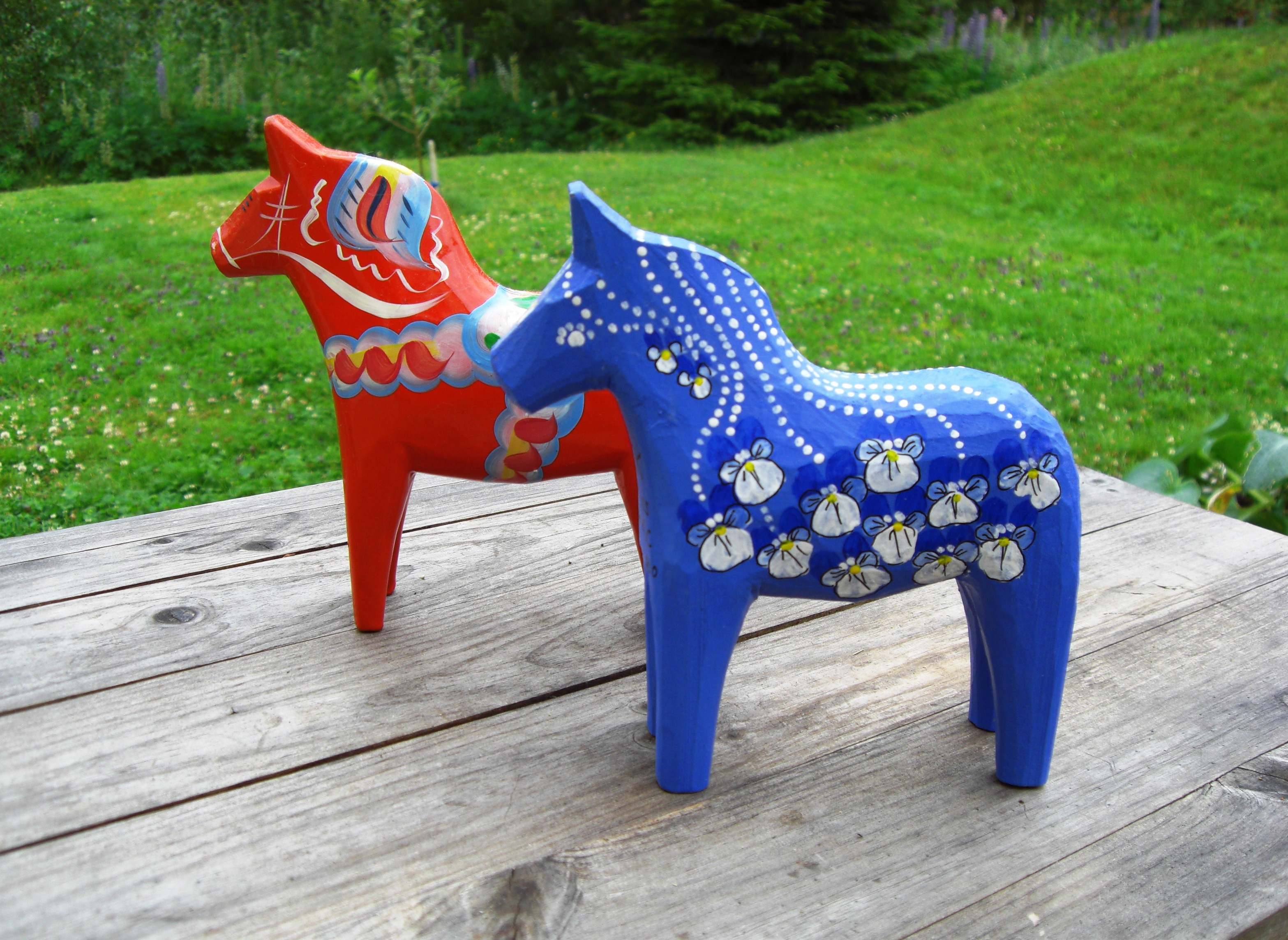 Лошадки